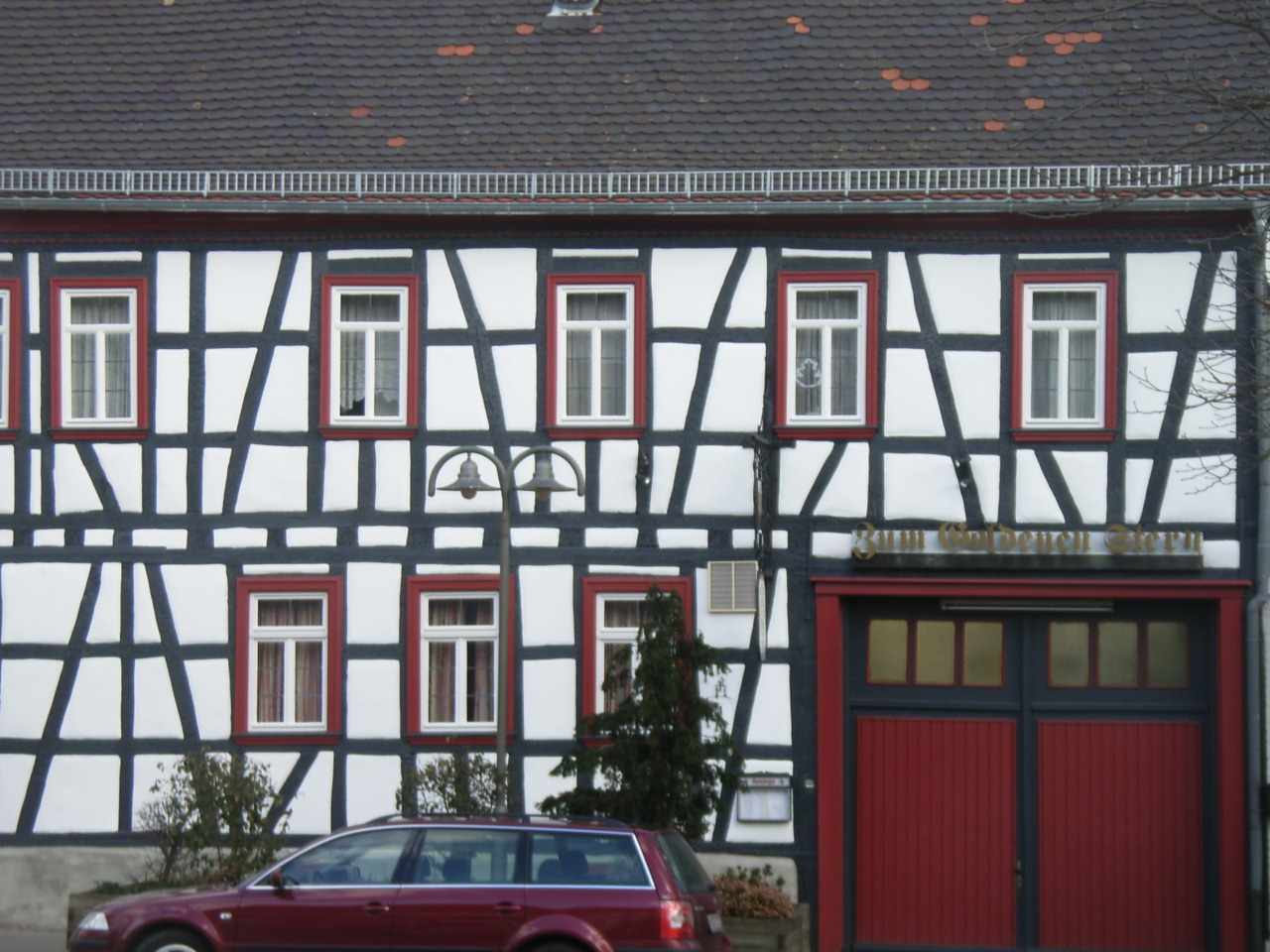 Ansicht des Gasthauses "Goldener Stern"